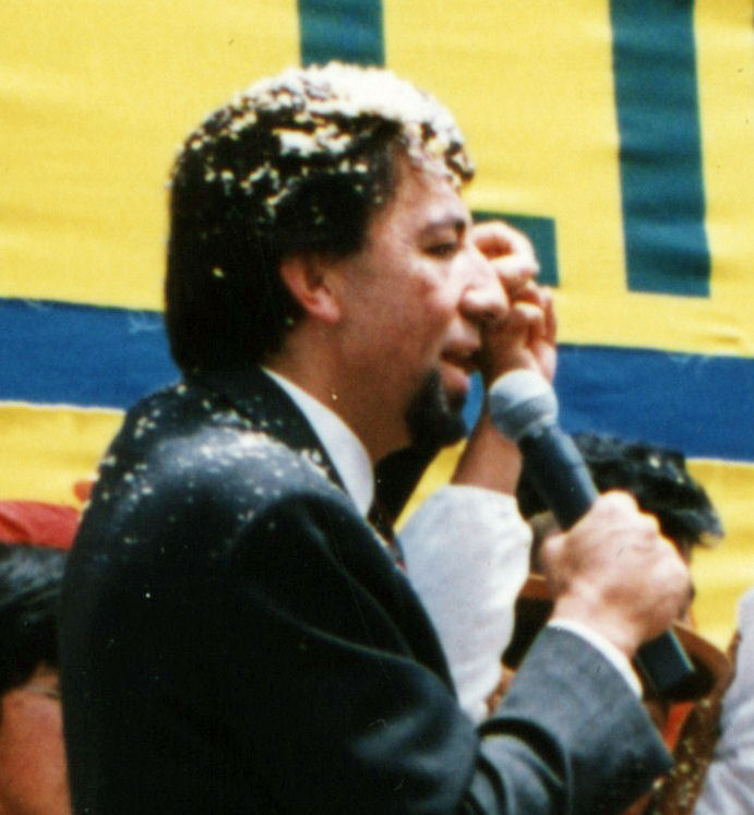 Recorte de imagen para ilustrar un artículo sobre Carlos Palenque